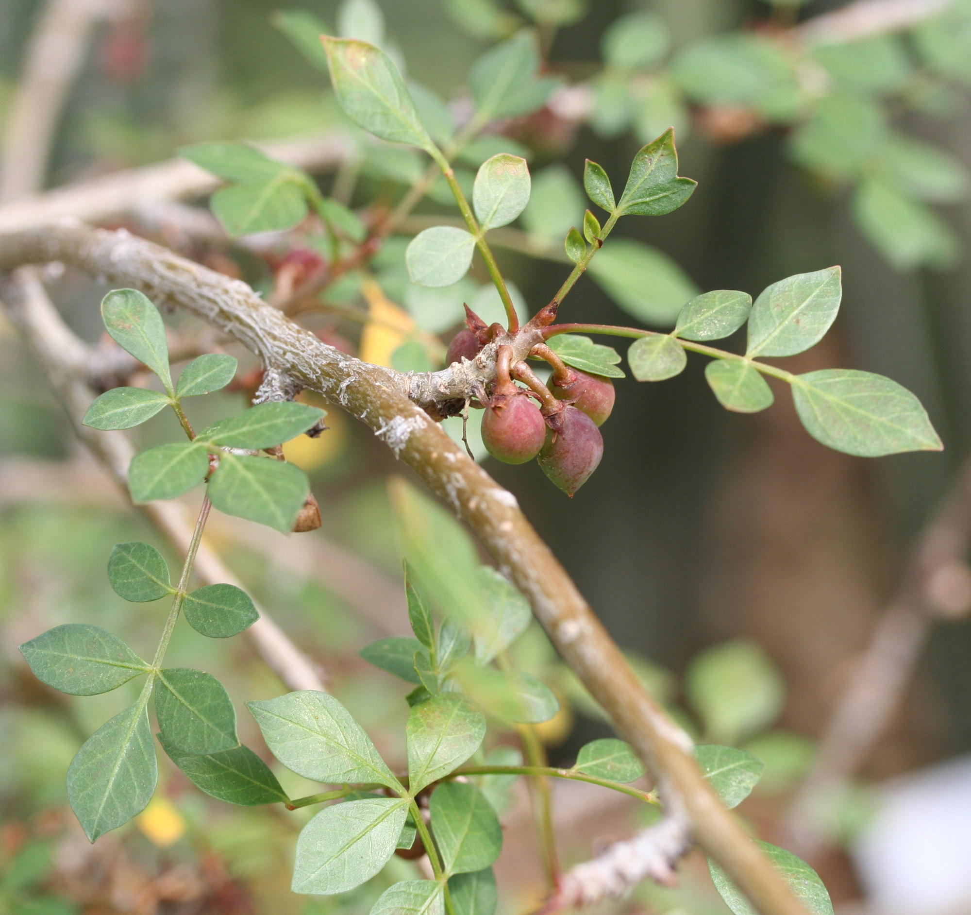 Bursera fagaroides im Botanischen Garten Dresden